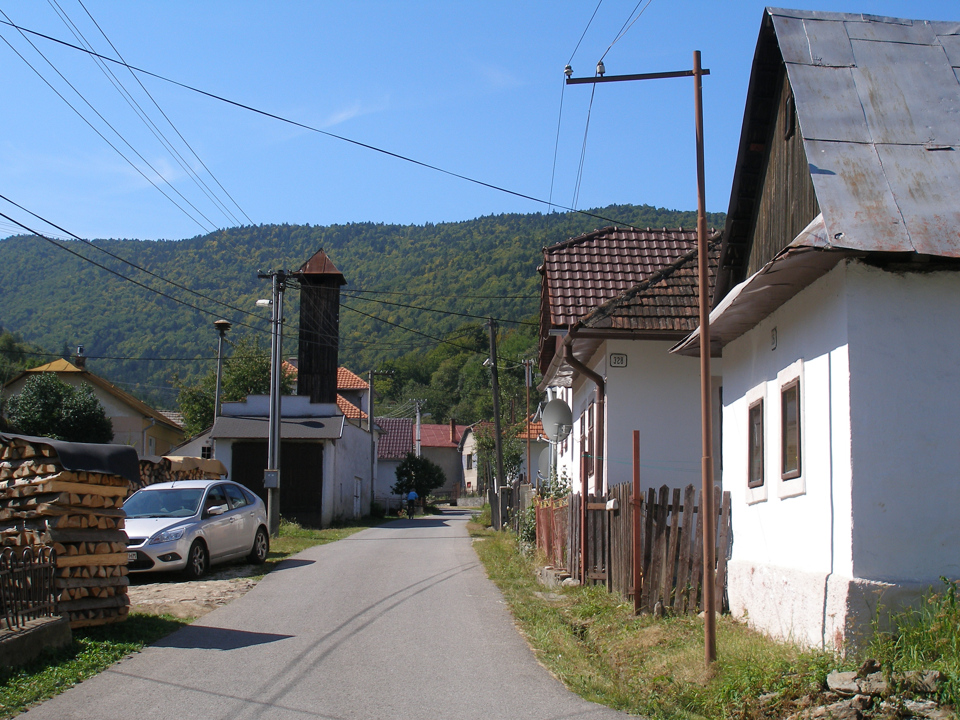 Spišská obec Kojšov. Okres Gelnica.